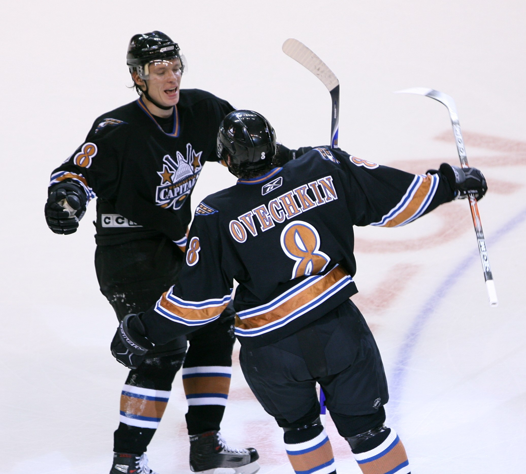 RO9A1259